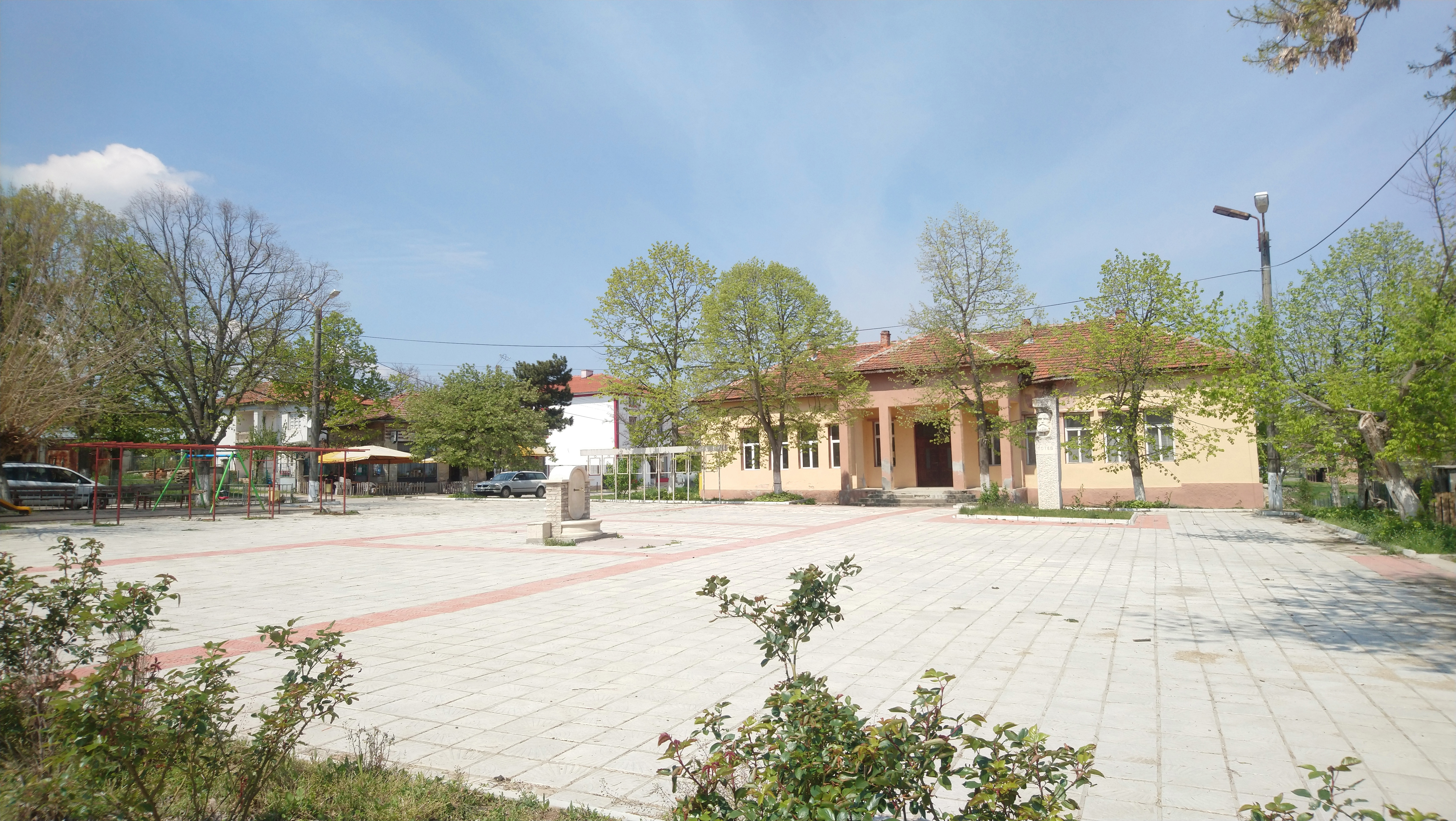 Центърът на село Долно Ботево